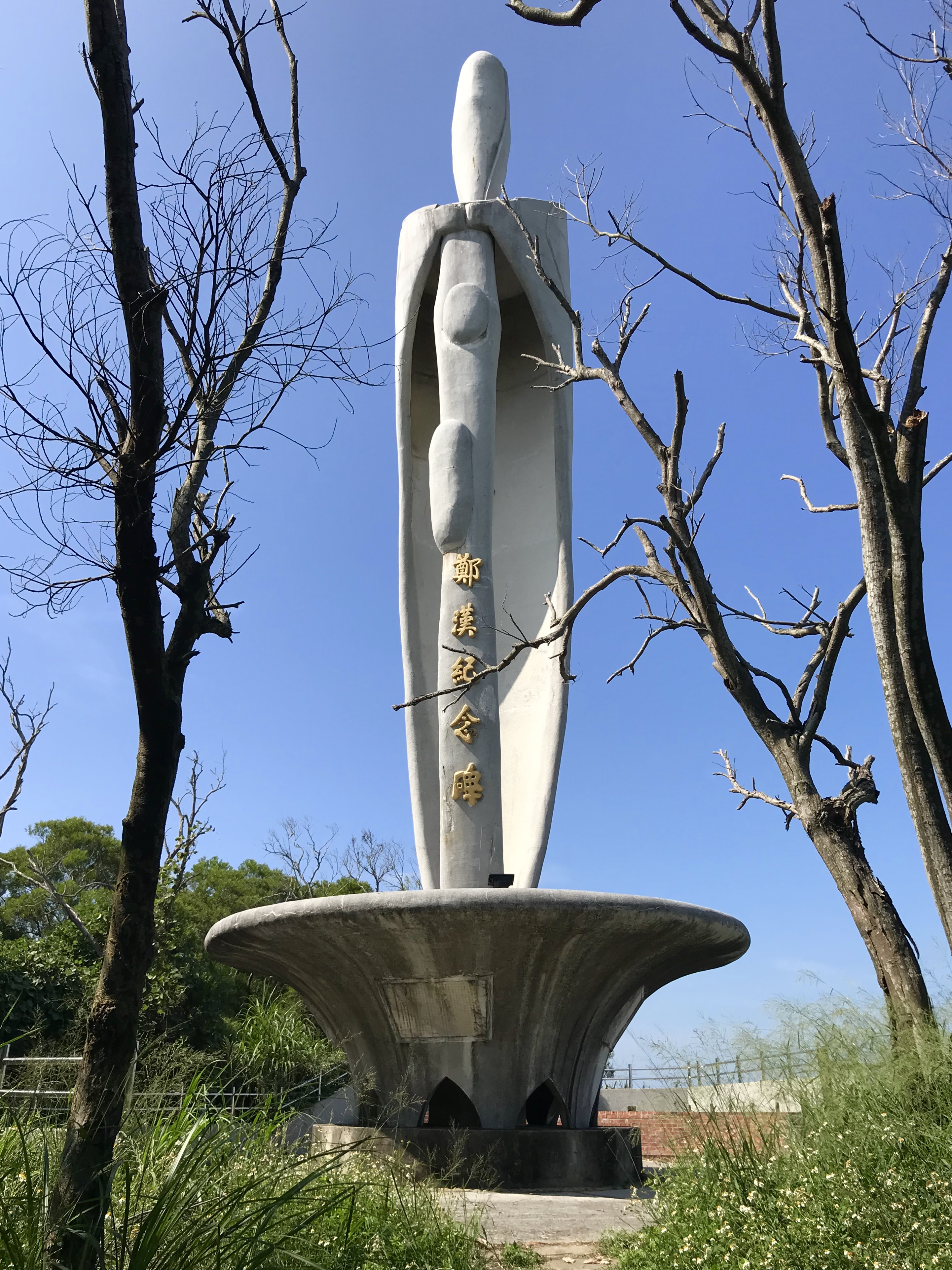 鄭漢紀念碑